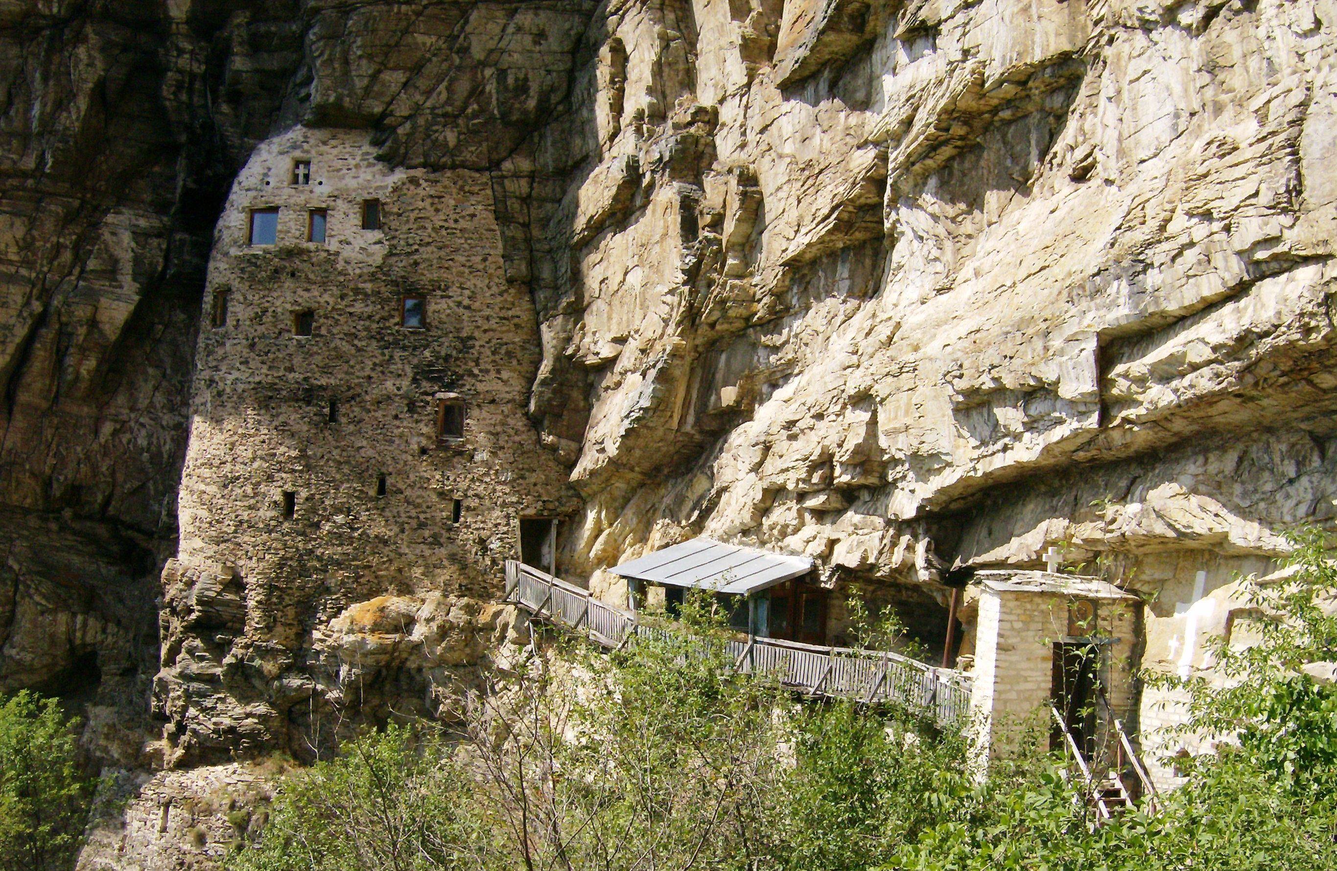 Isposnica Svetog Save kod Studenice